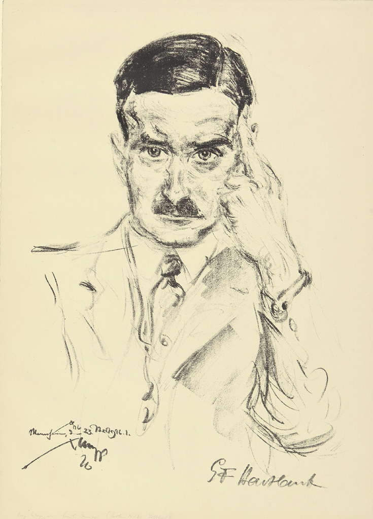 Portrait GF Hartlaub, 1926, Lithographie, Blattmaß: 45,4 x 32,4 cm; Kunsthalle Mannheim, Inv. Nr. G2382 Kunsthalle Mannheim Native nameKunsthalle MannheimLocationMannheim, GermanyCoordinates49° 28′ 58″ N, 8° 28′ 31″ E Established1907Website control VIAF: 129658594 ISNI: 0000 0001 2109 6839 LCCN: n81080107 GND: 2022808-9 WorldCat Signatur: im Stein u.li.: "Mannheim, den 23. März 16.1.[unleserlich] // Stumpp // 26"